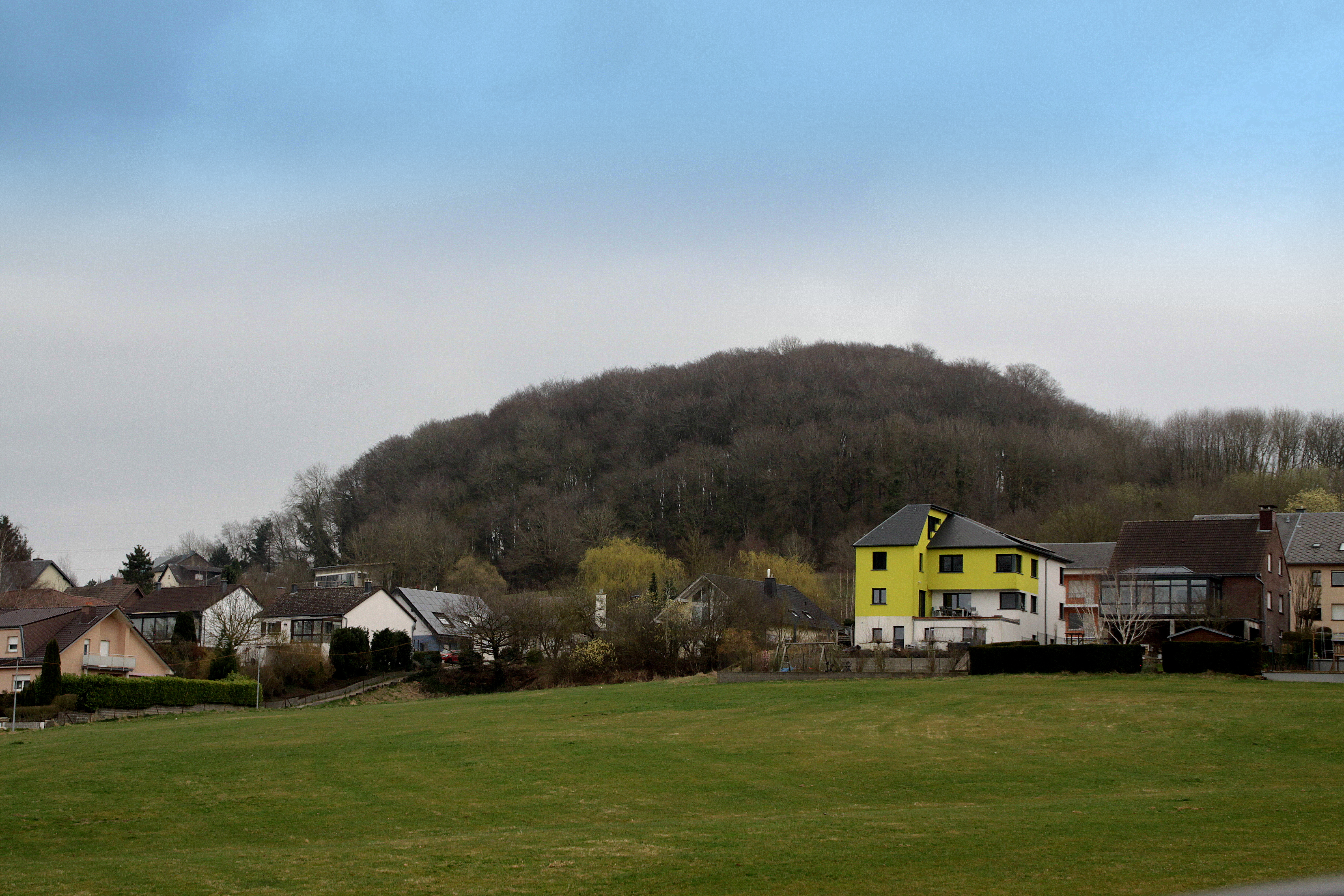 De Lëtschet vu Weste gesinn